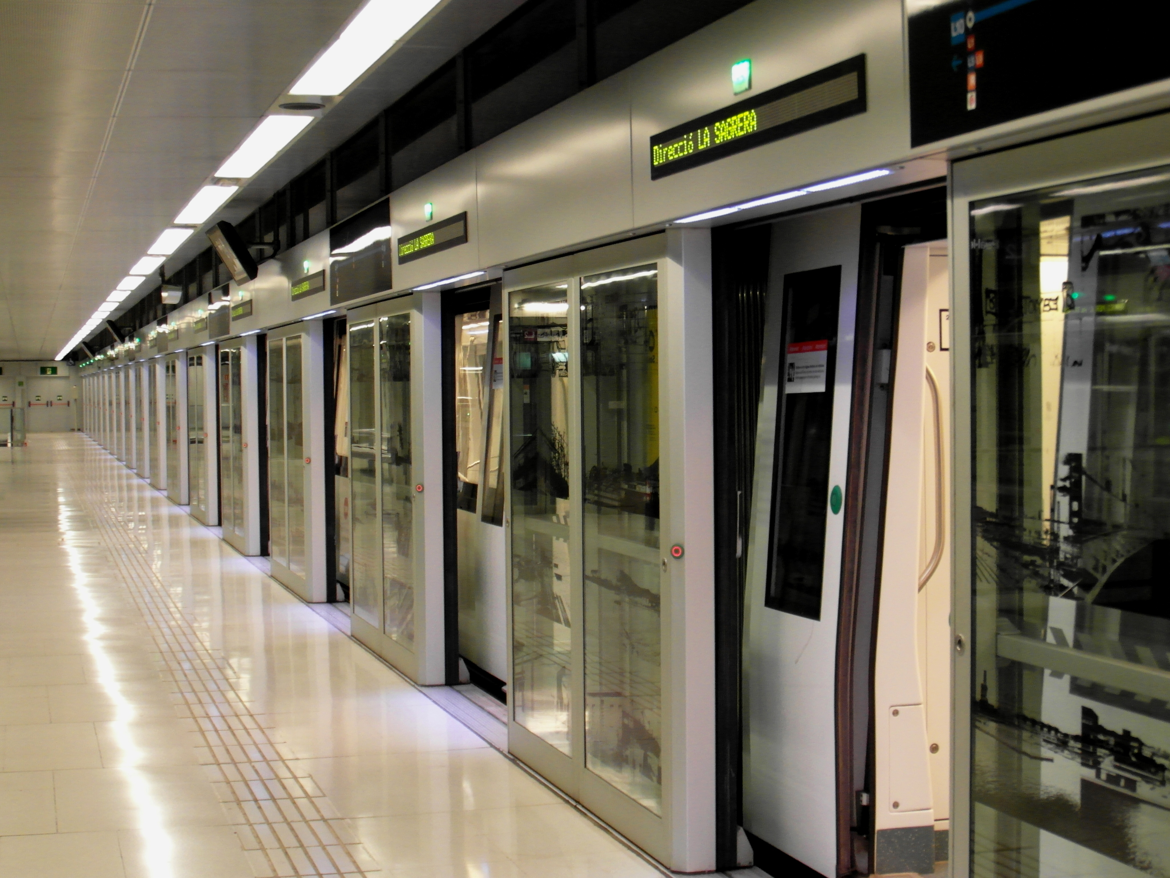 Barcelona - Estació de Gorg